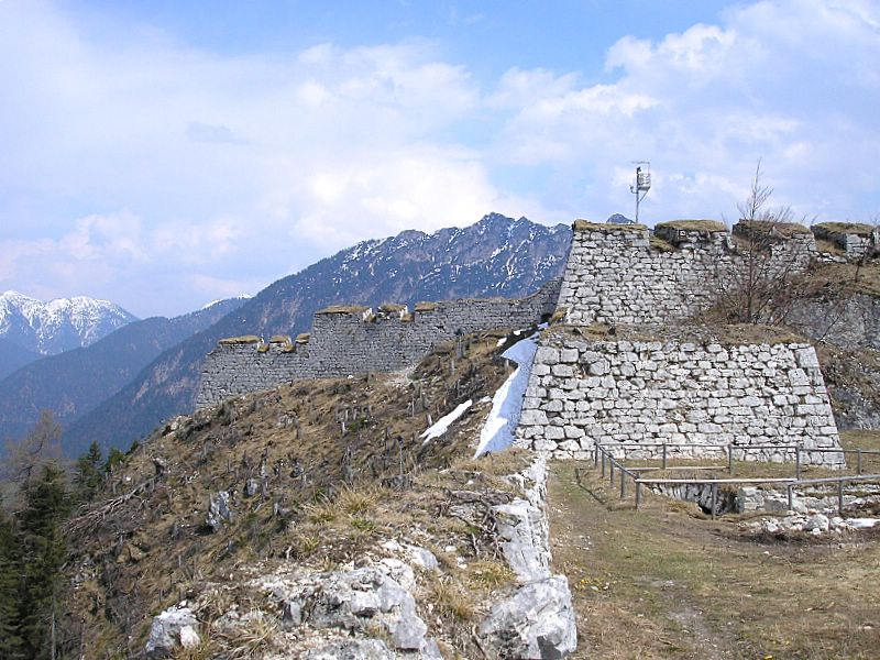 Festung Schlosskopf bei Reutte (Tirol). Nordseite nach Osten.